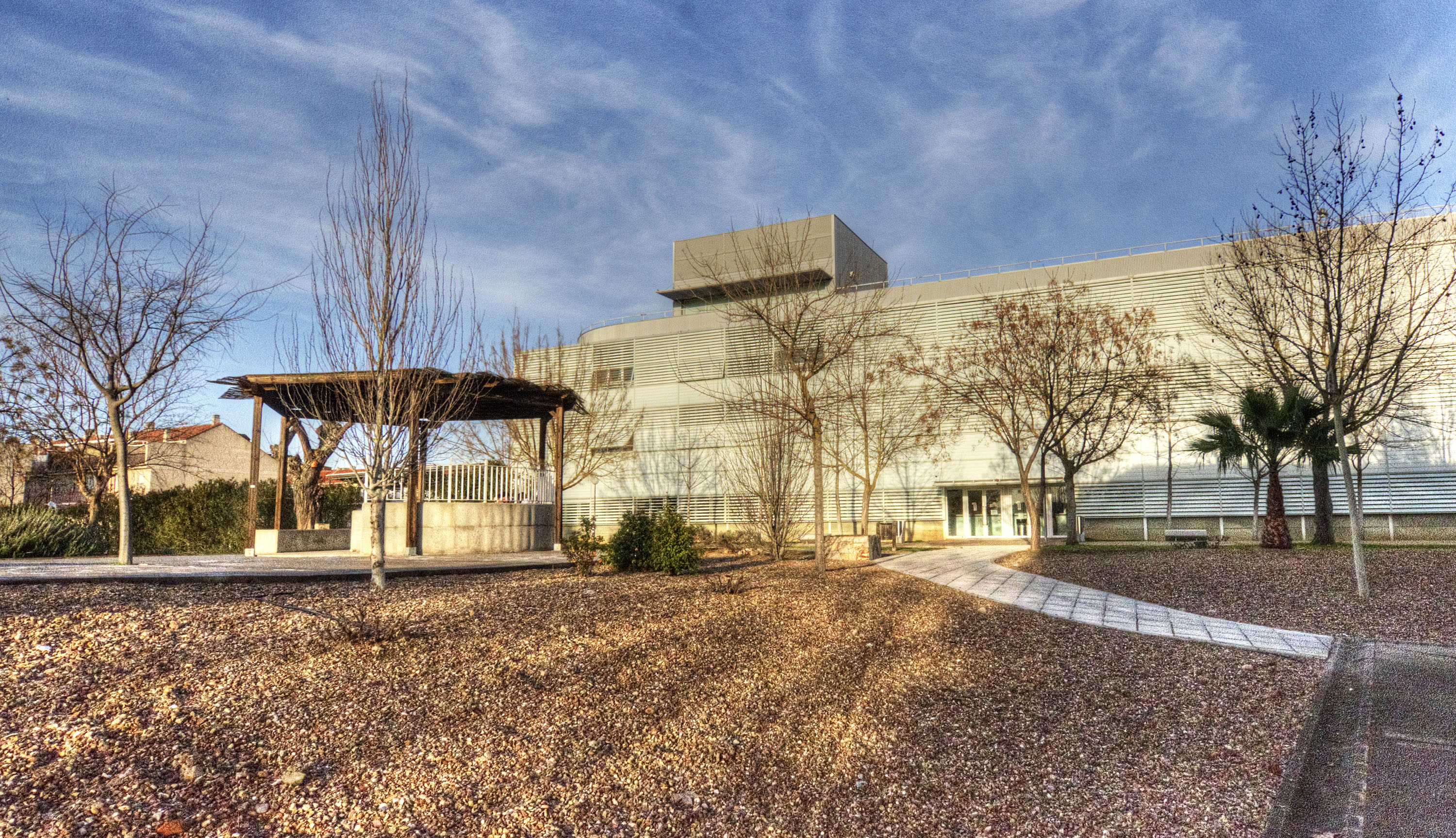 Centro Universitario de Mérida - Edificio administrativo